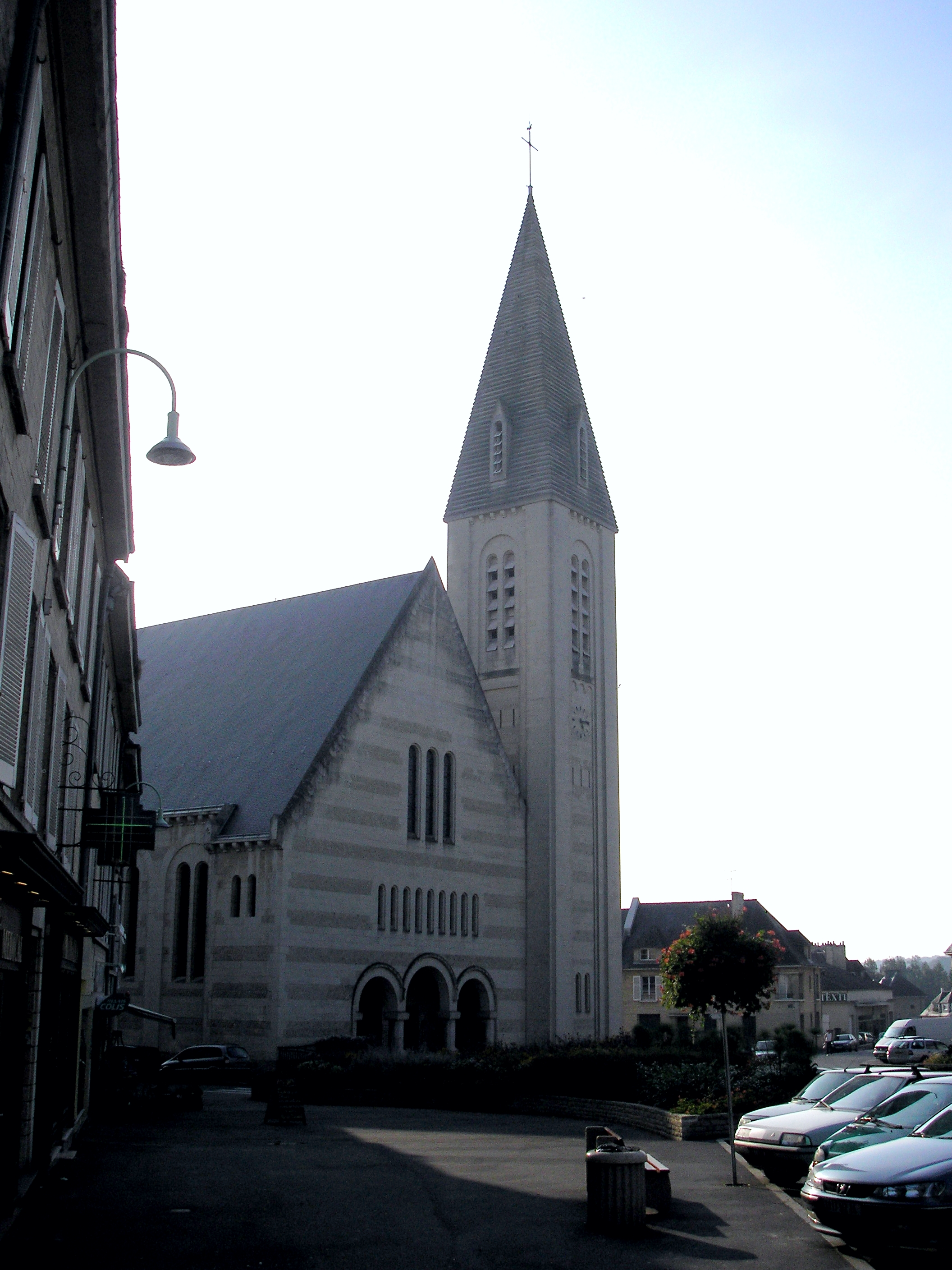 Aunay-sur-Odon (Normandie, France). L'église Saint-Samson.